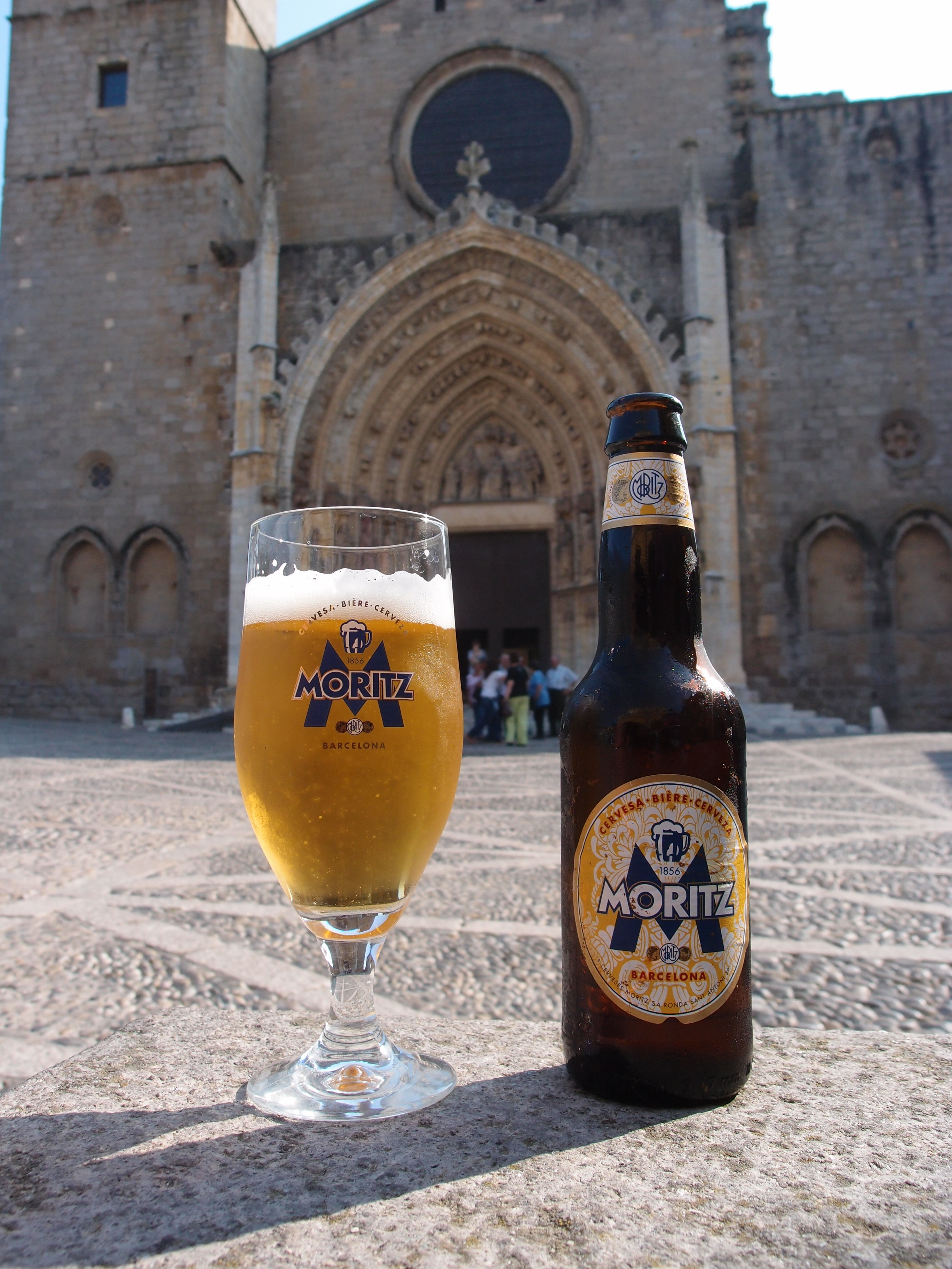 Cerveza Moritz Datum: 29.09.2011 Urheber: M. Pfeiffer alias Gordito1869 Quelle: Privates Fotoarchiv des Urhebers